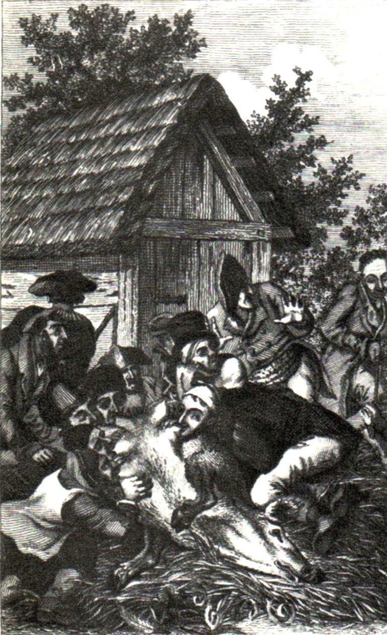 Frontispiz zu Die Judenschule (Aarau 1822) nach Shachar, The Judensau, 1974, Tafel 58b